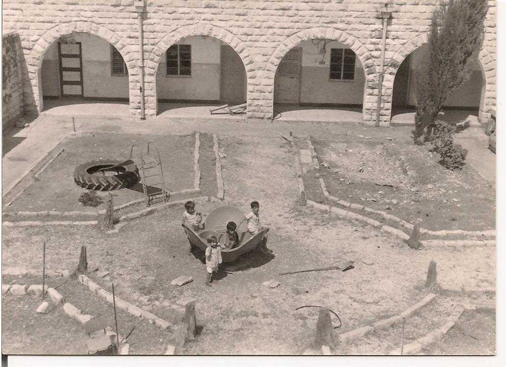 ילדי היישוב משחקים בחצר הפנימית 1977